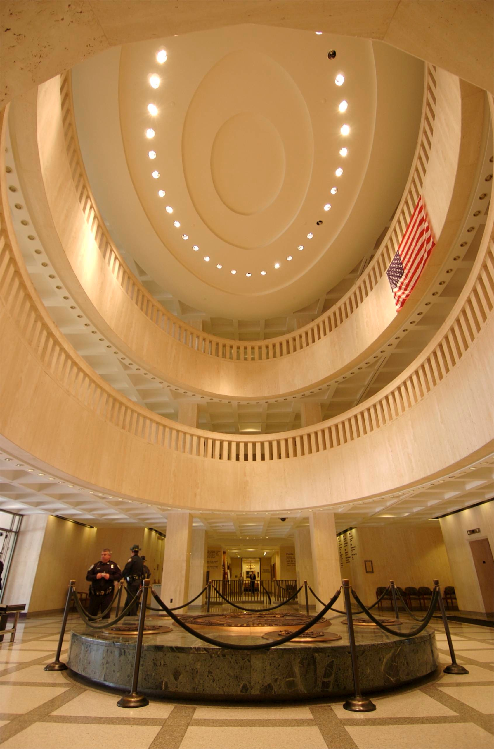 Florida State Capitol interior